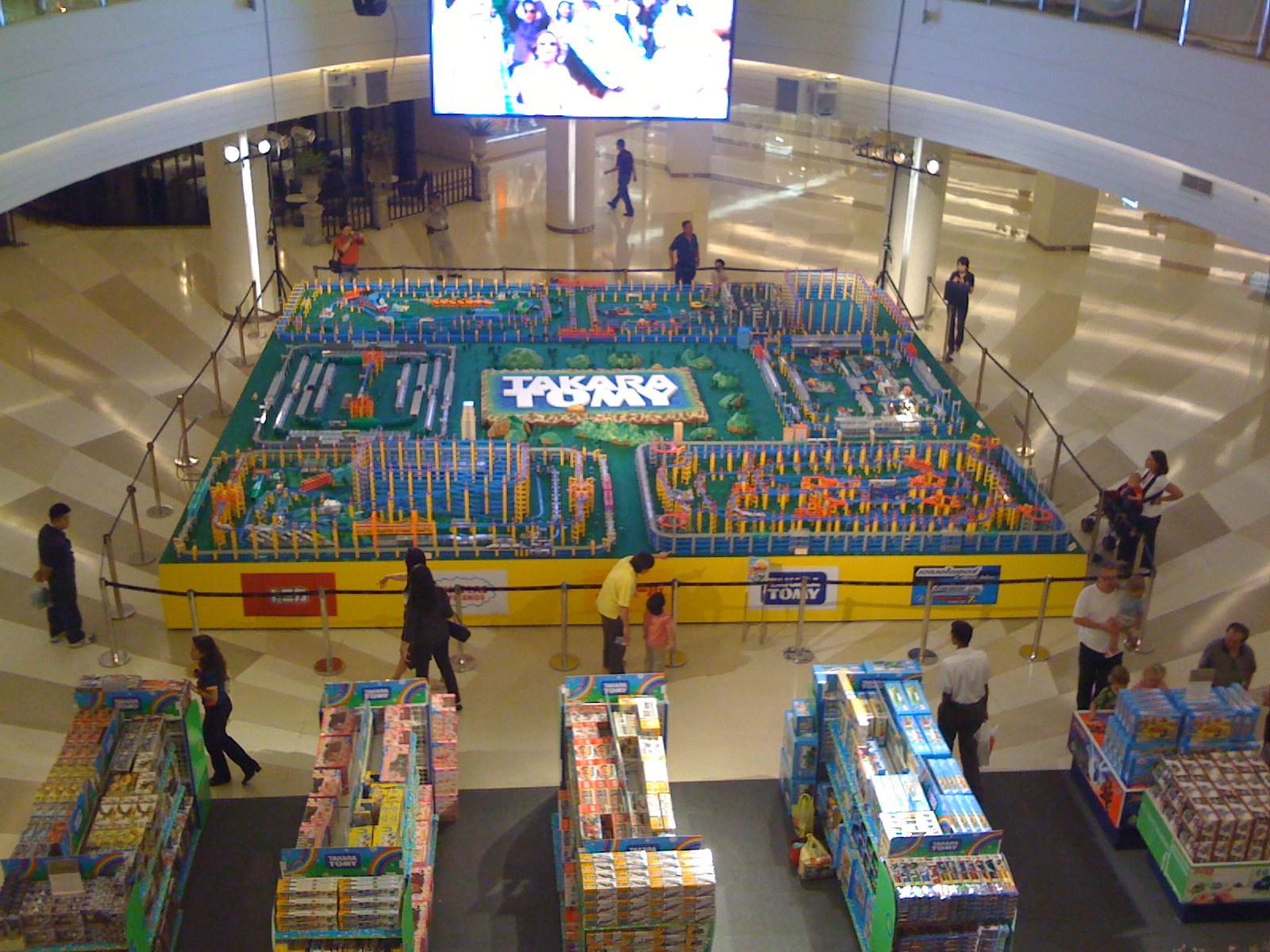 電車